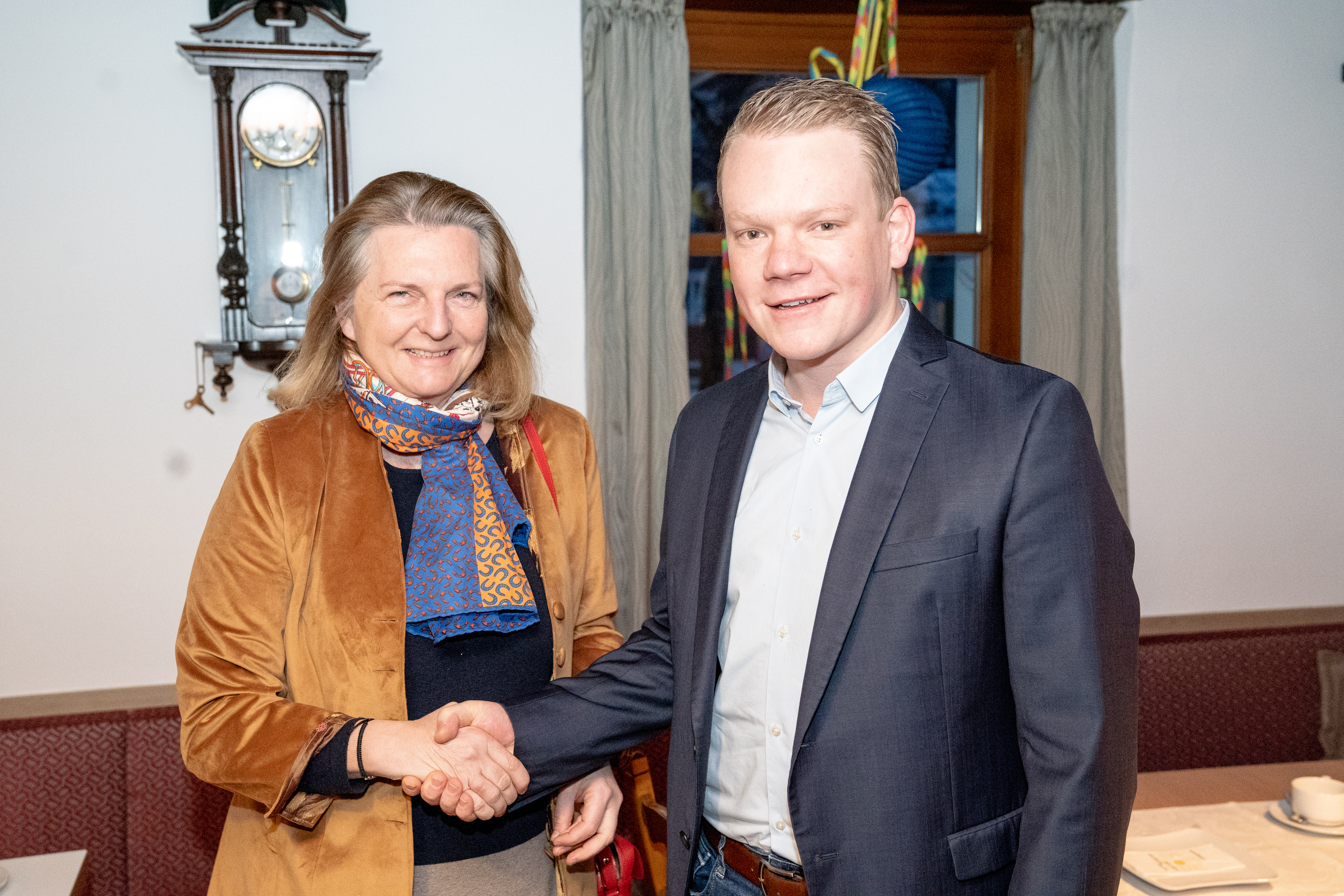 Karin Kneissl zu Gast in Bregenz